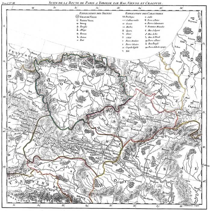 Репринт страницы атласа к Путешествию по Сибири 1769 года